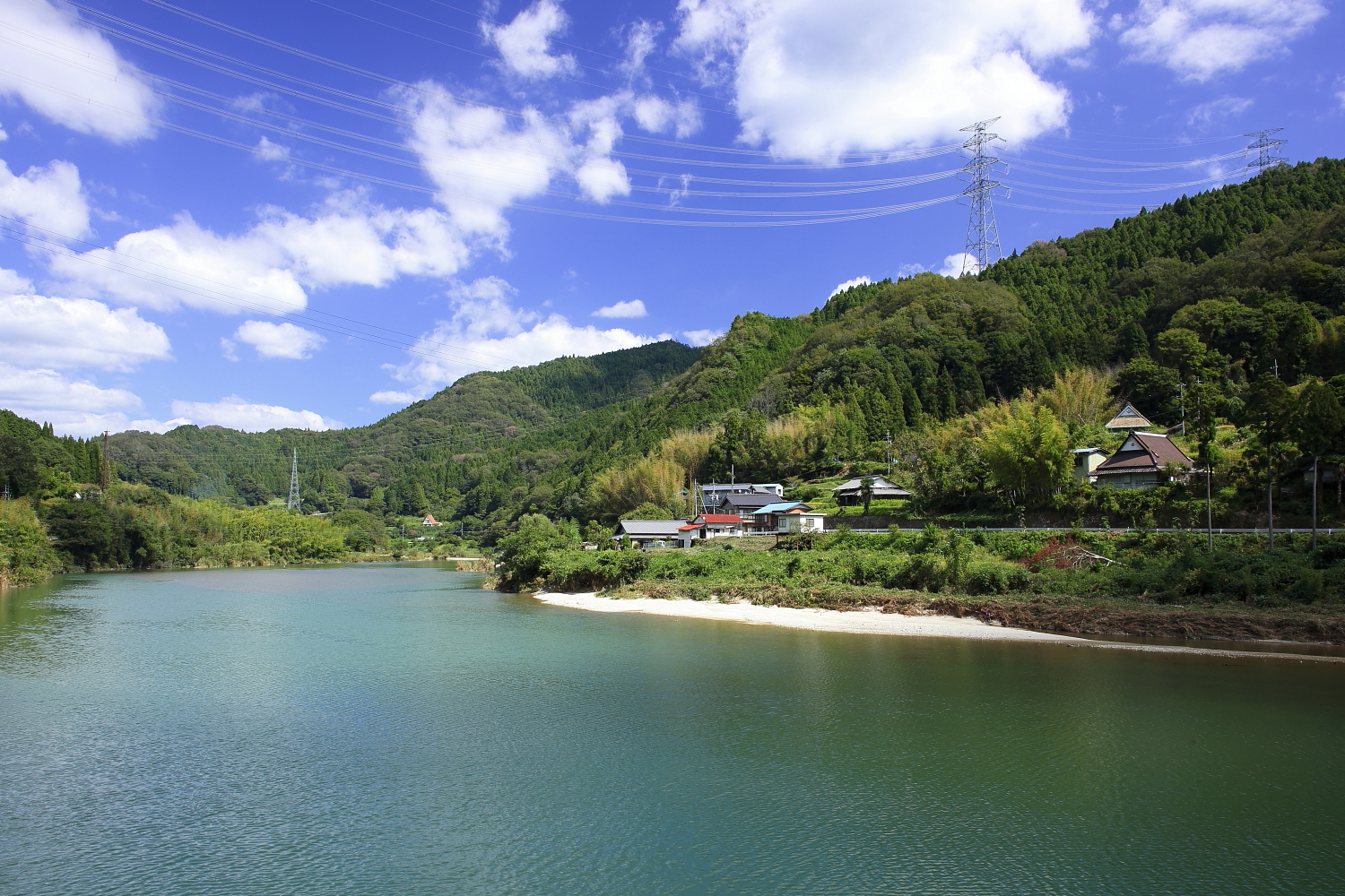 矢作川（豊田市簗平町付近、2013年）